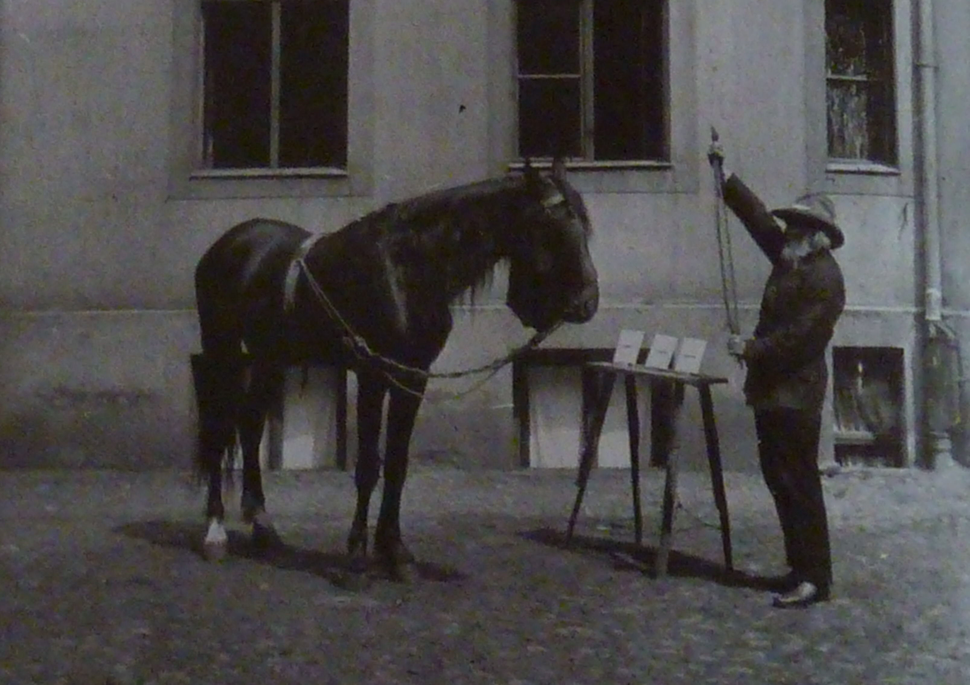 Der kluge Hans lernt den Unterschied zwischen gerade und krumm.